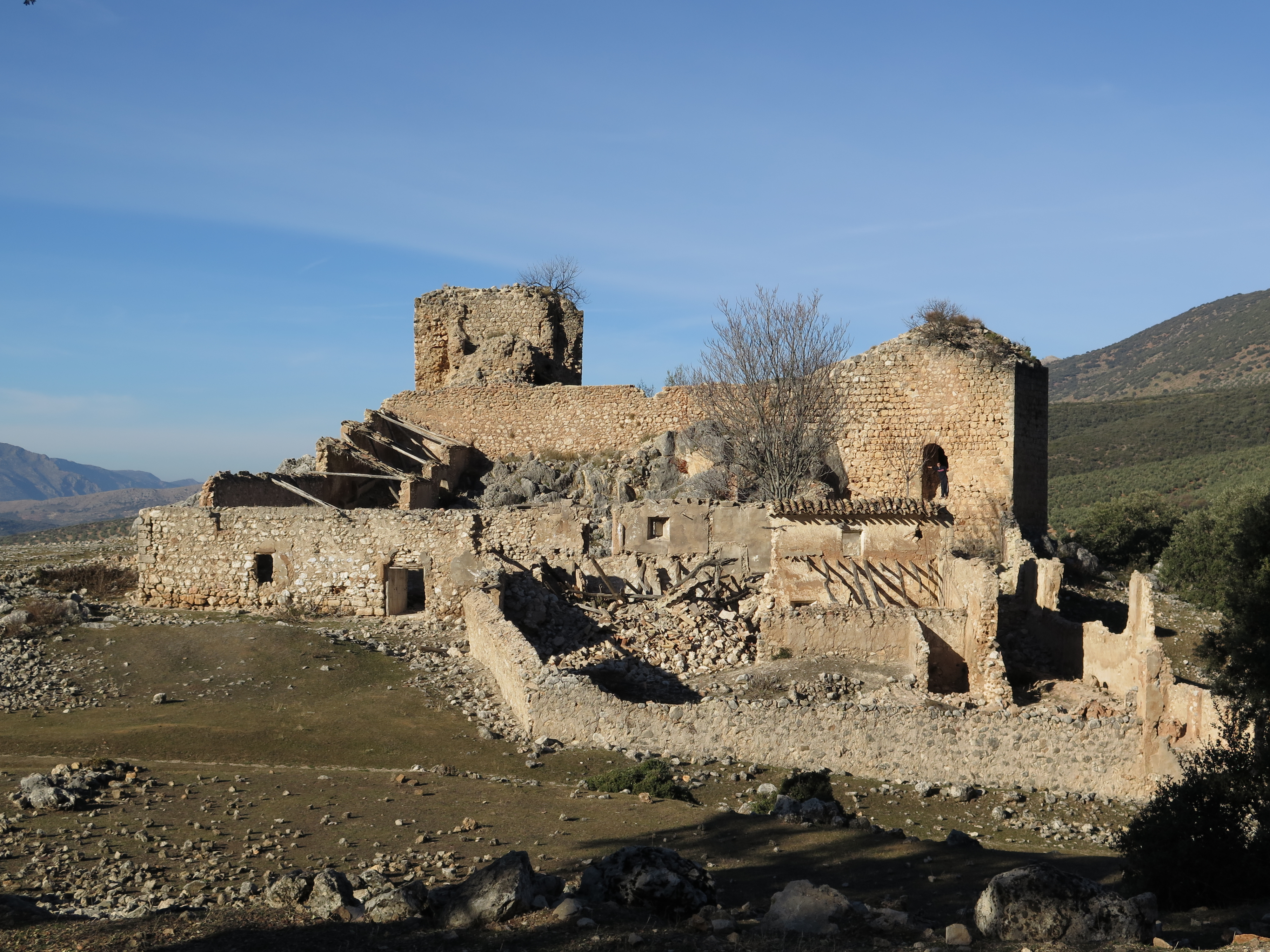 Vista general del Castillo de Mata Bejid.